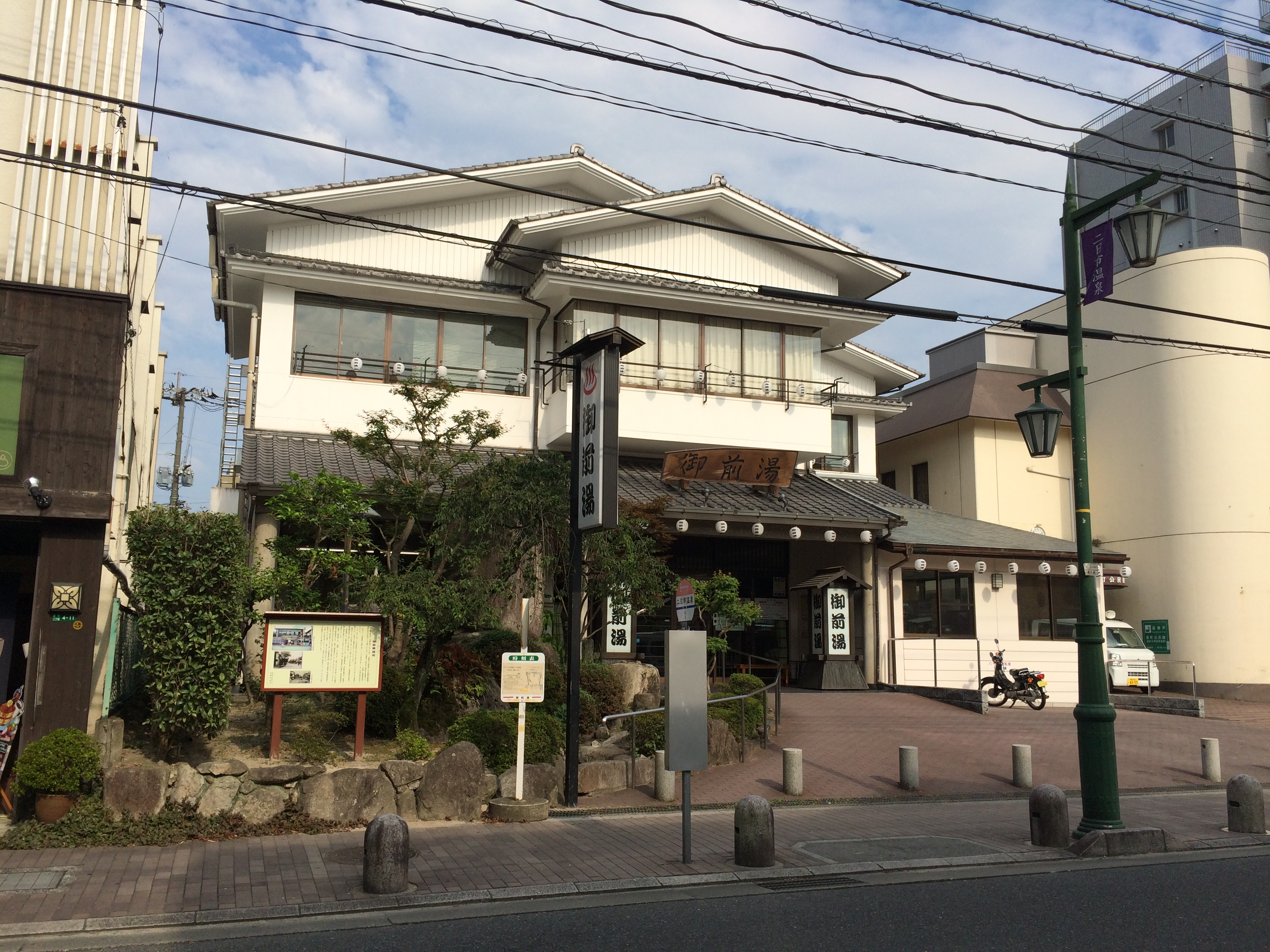 筑紫野市二日市温泉御前湯